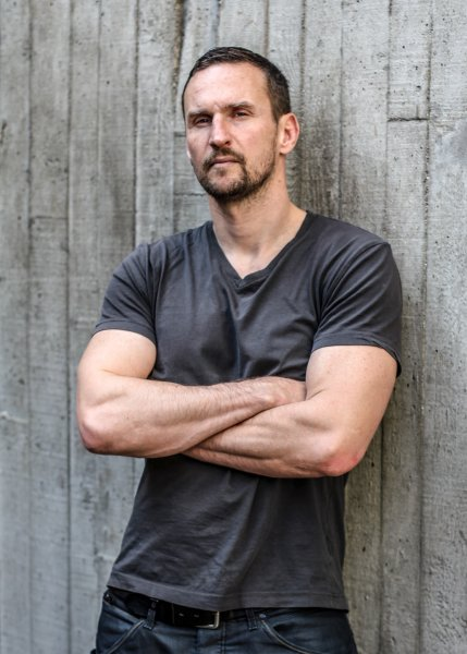 Cascadeur